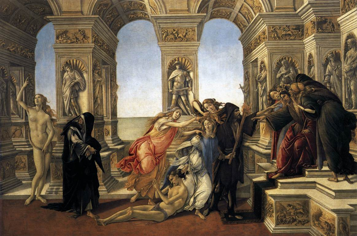 BOTTICELLI, Sandro Calumny of Apelles Tempera on panel, 62 x 91 cm Galleria degli Uffizi, Florence